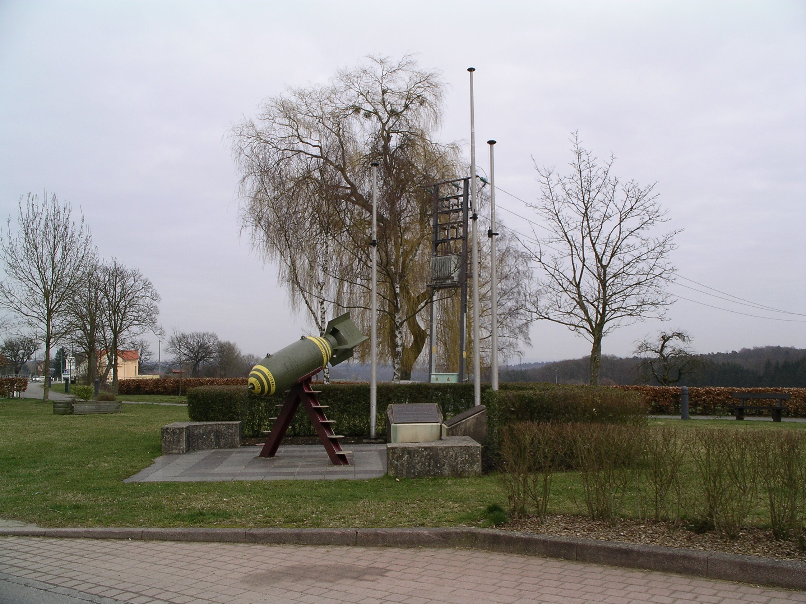 Consdorf, Denkmal an den Zweiten Weltkrieg